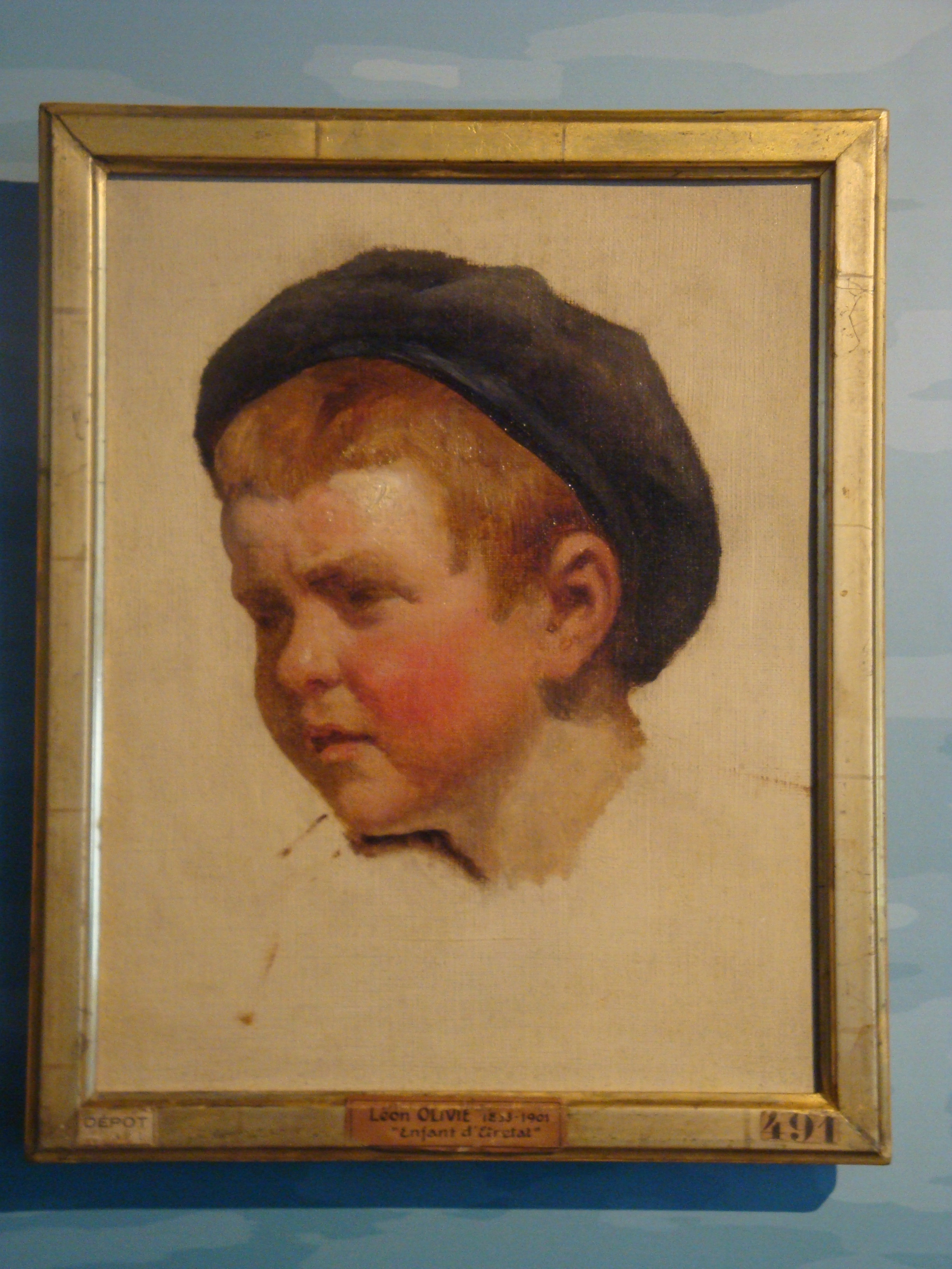 Portrait d'un enfant d'Etretat par Léon Olivié (1833-1901)